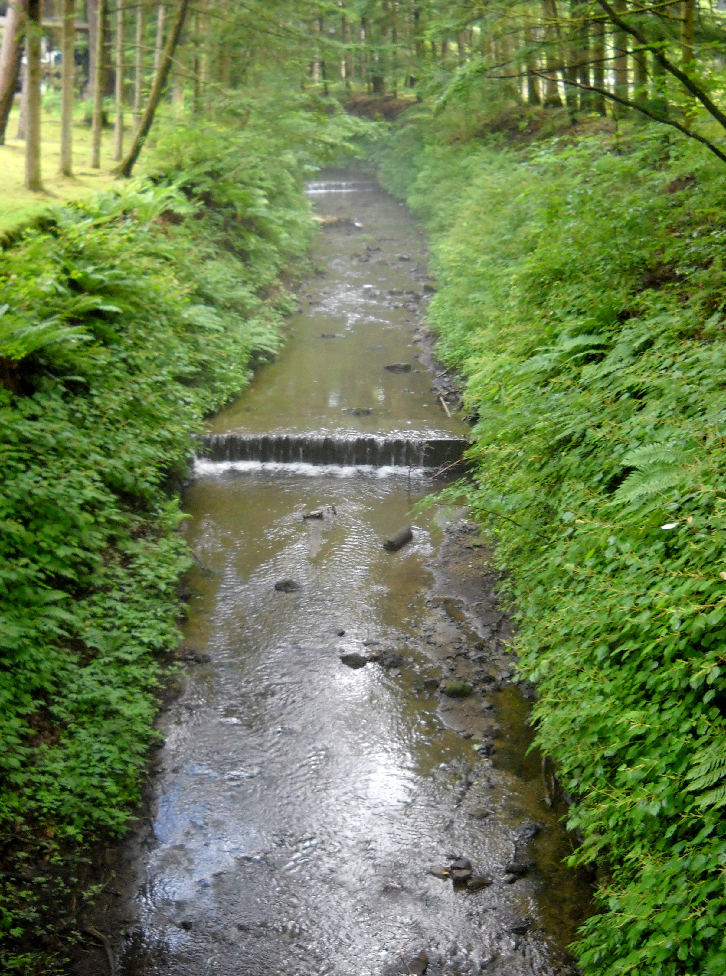 精進場川（長野県北佐久郡軽井沢町三笠）